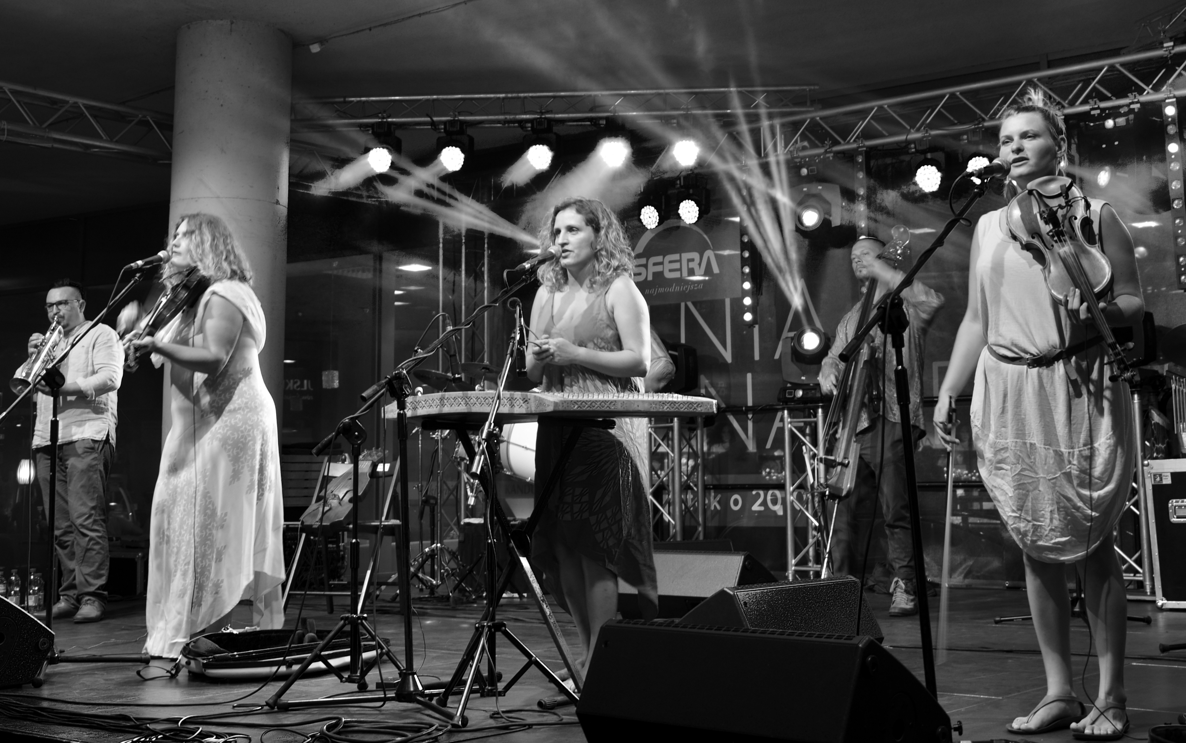 Die Kapelle aus dem Dorf Warschau